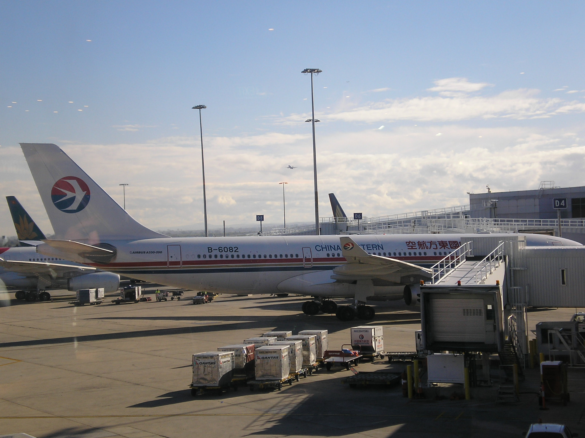 MU565 operated by an Airbus A330-200 (B-6082) after being diverted due to fog has finally landed into MEL from Shanghai-Pudong. It docked into T2 Gate 4. Photo taken by me, JU580 on 10 July 2007